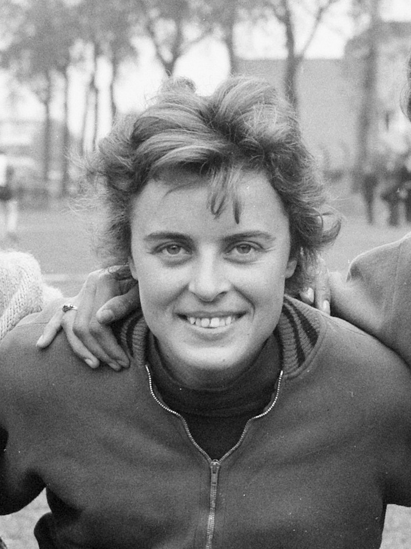 Atletiek te Rotterdam, Tilly van der Zwaard